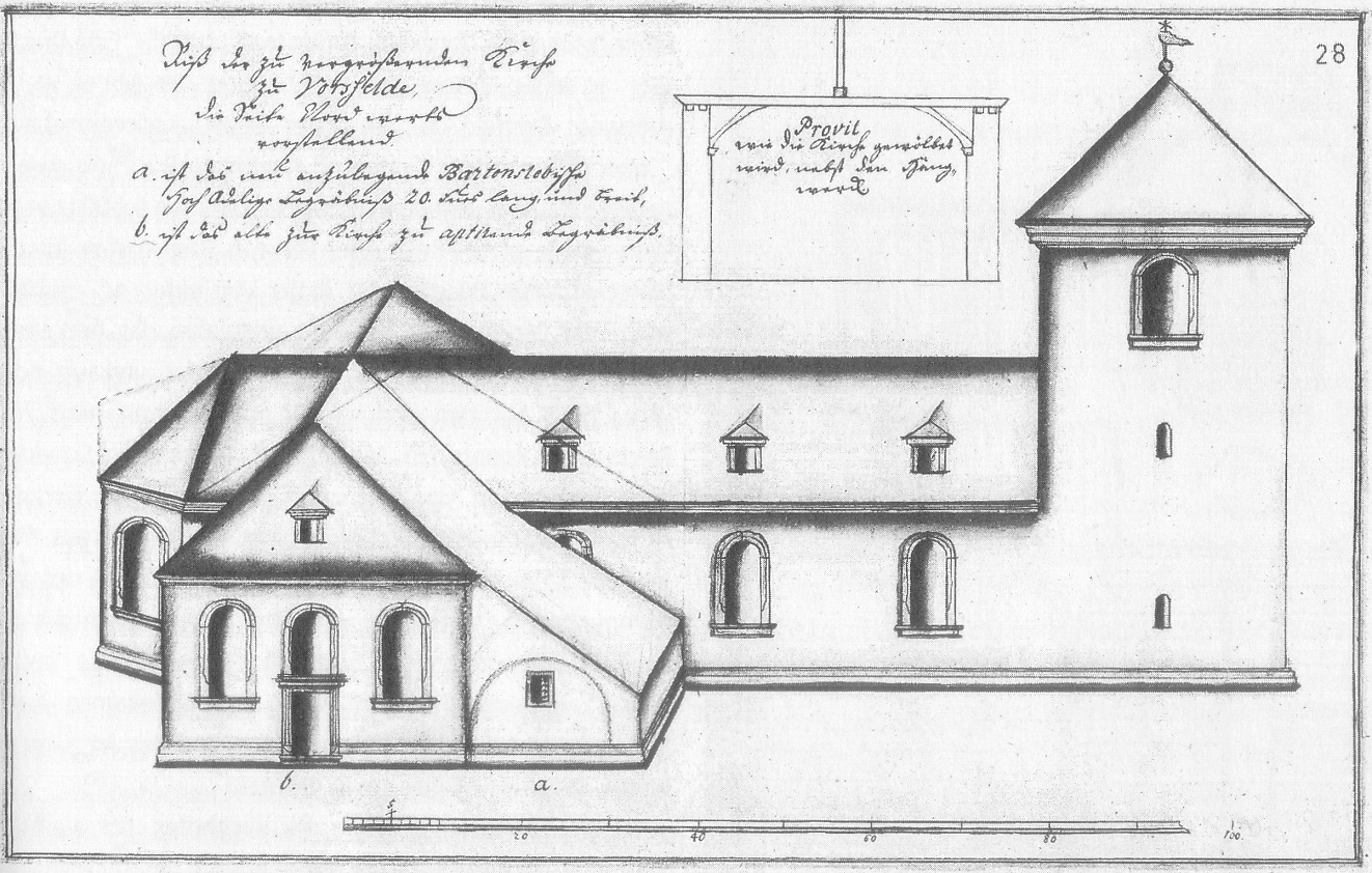 Petrus Kirche Vorsfelde um 1750